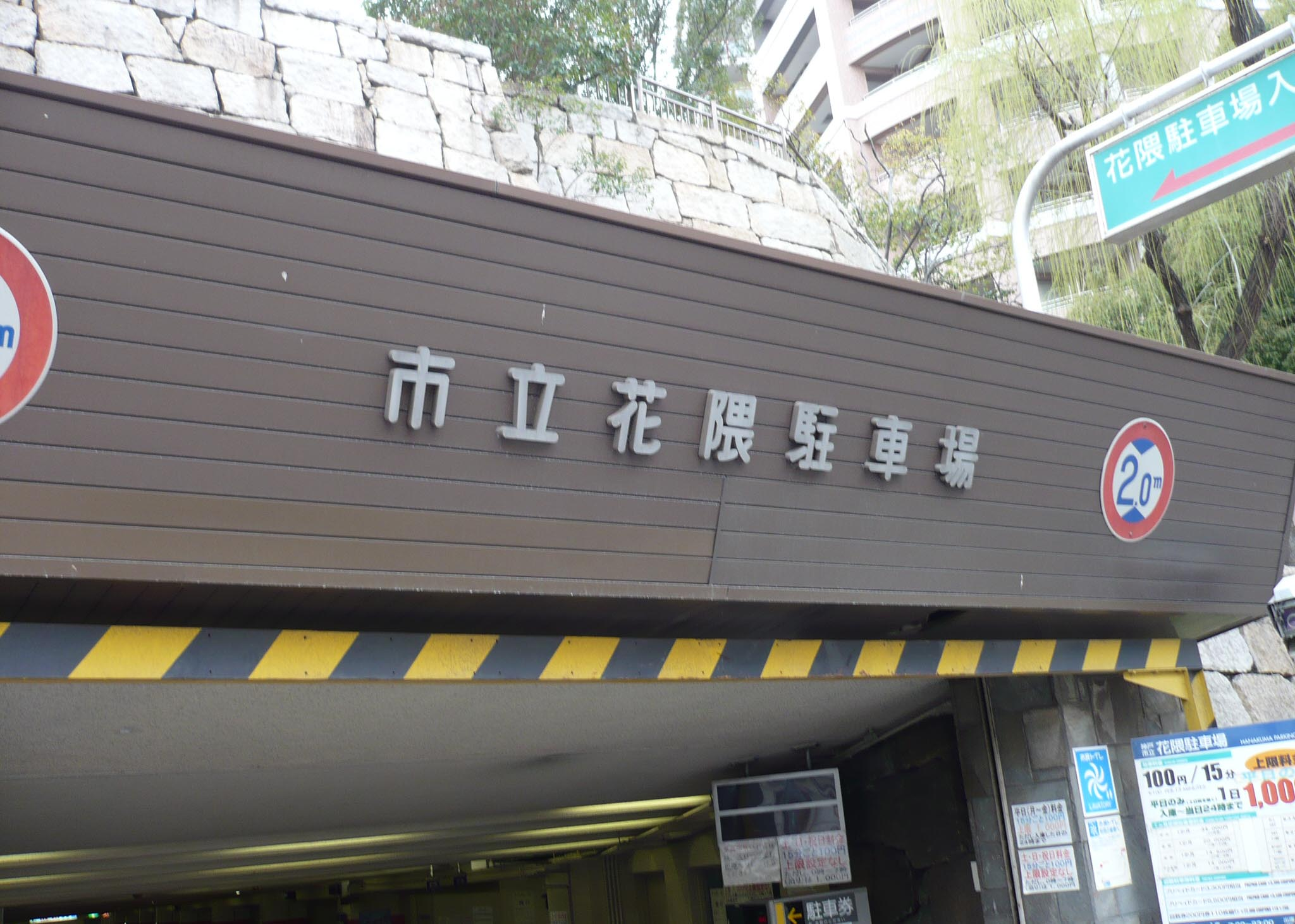 花隈公園駐車場入り口